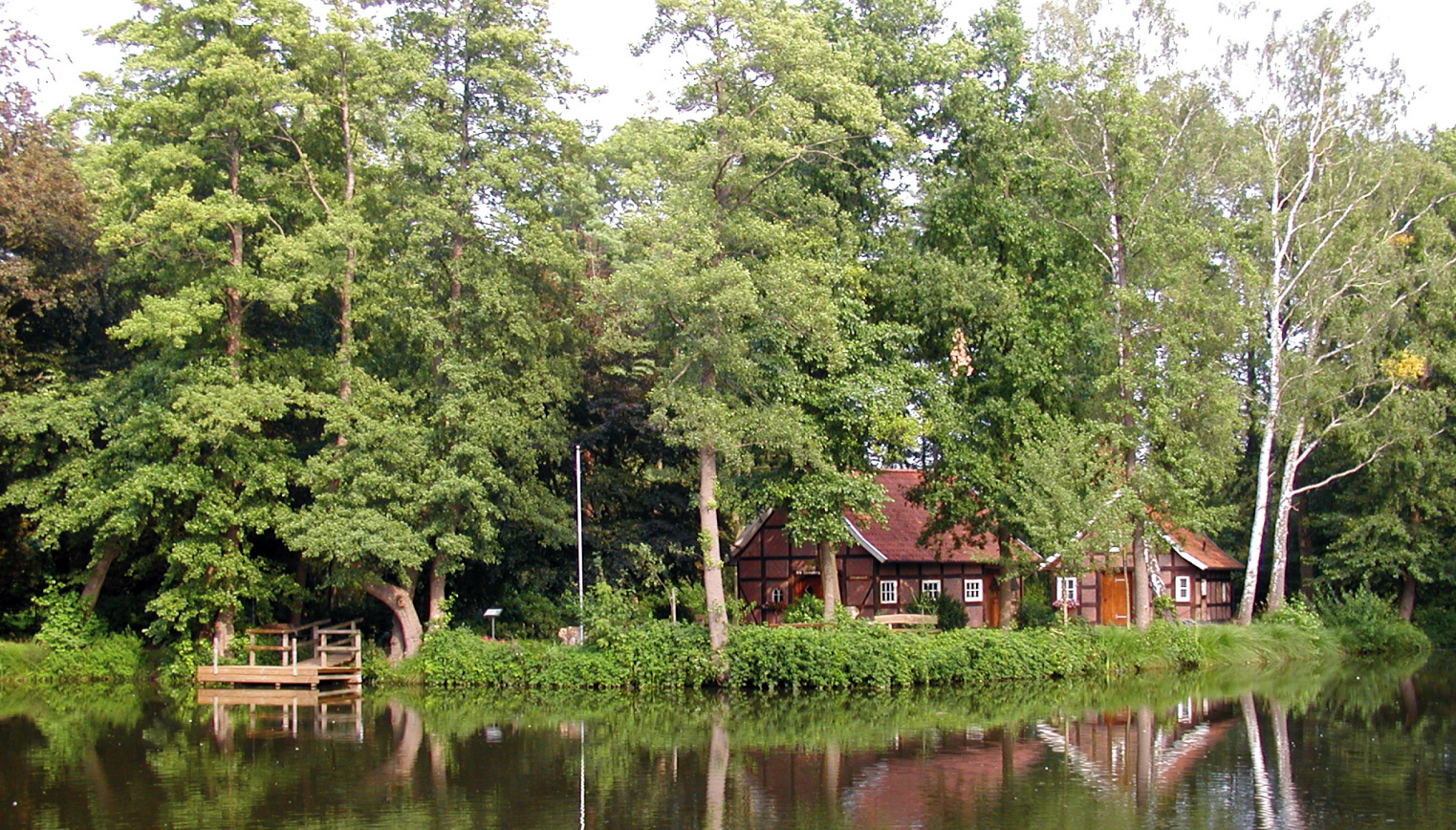 Bild vom Siedenburger Mühlenteich im Ortskern